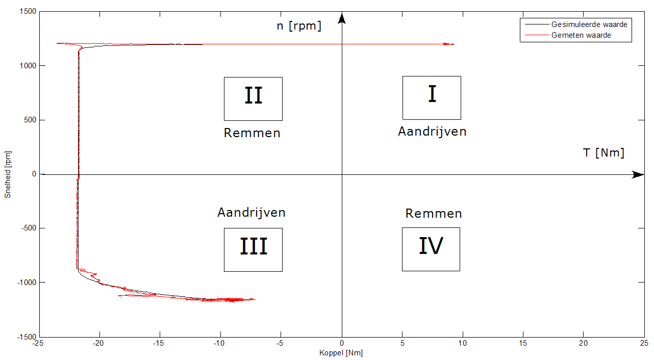 Zelf opgemeten en gesimuleerde vierkwadrantenvoorstelling